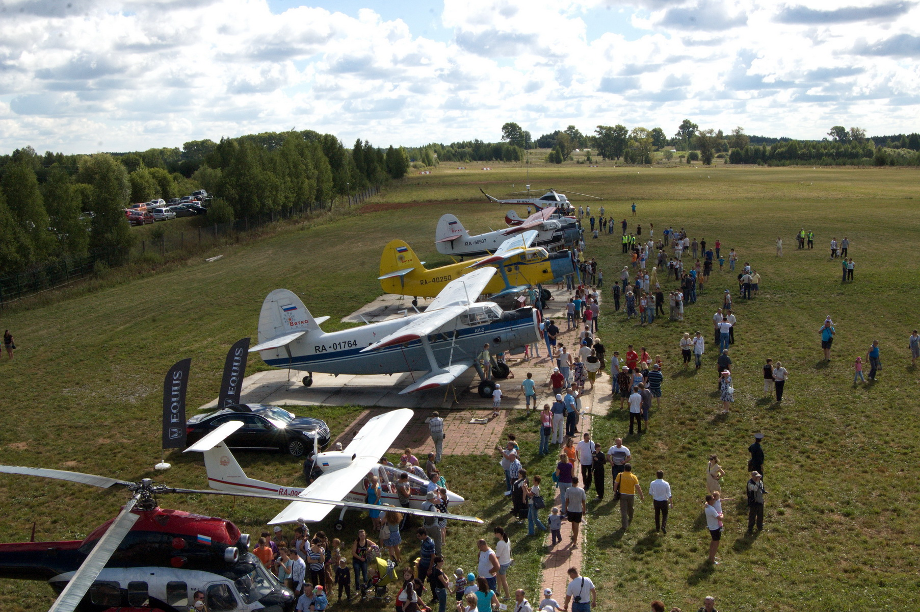 Праздник "День Воздушного флота" 2013